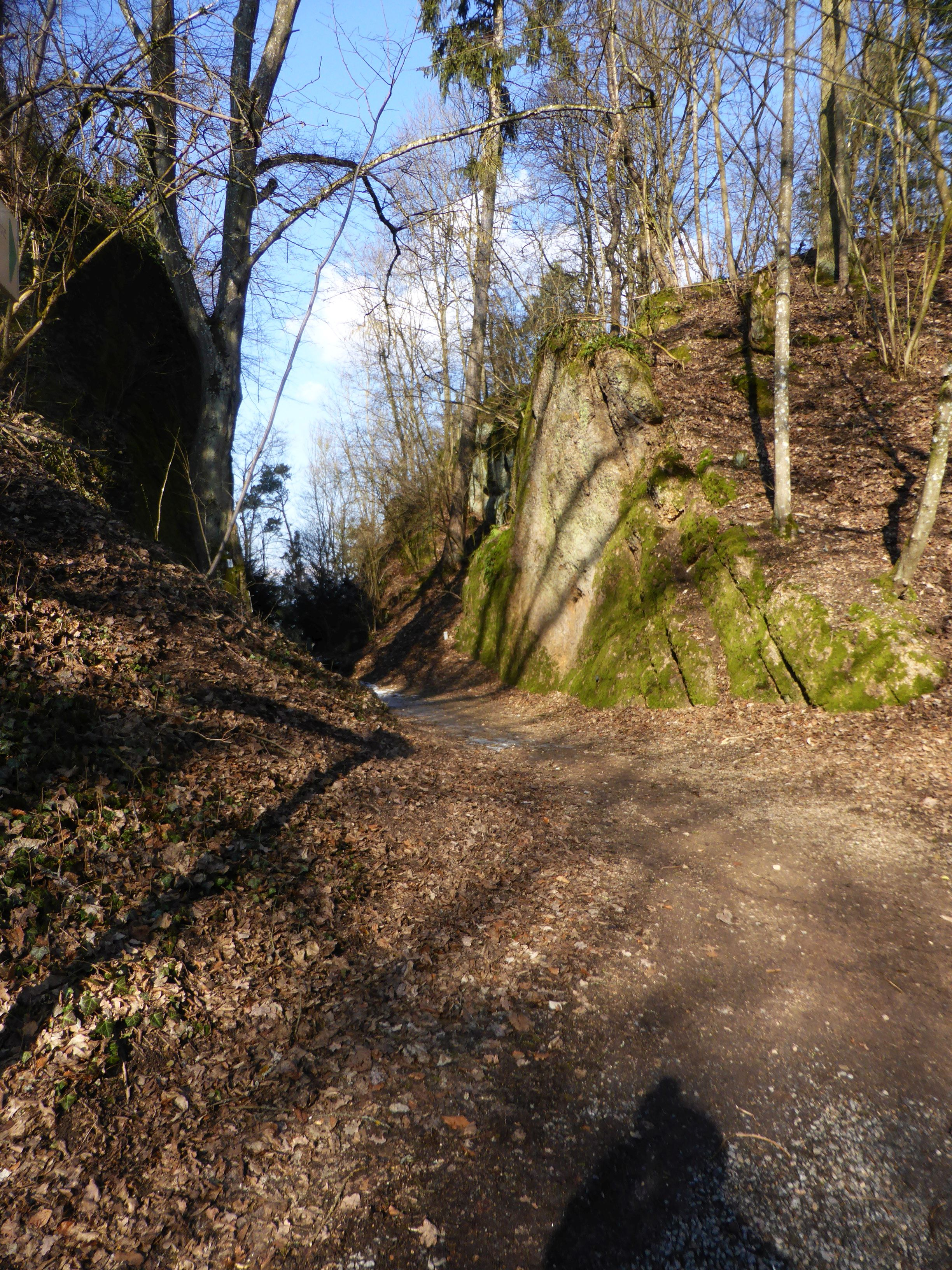 Ehemaliger Graben der Burg Regenstauf